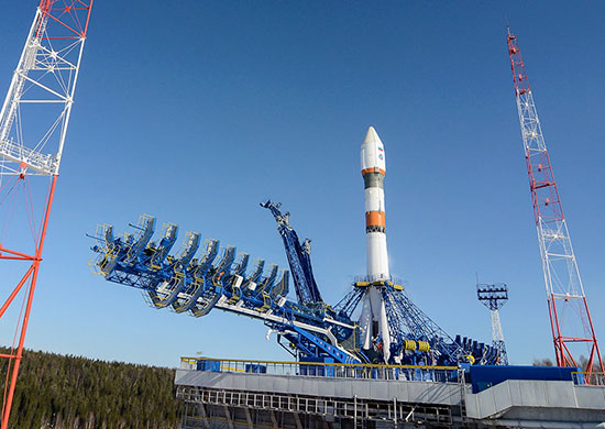 Ракета-носитель «Союз-2» перед пуском с космодрома Плесецк